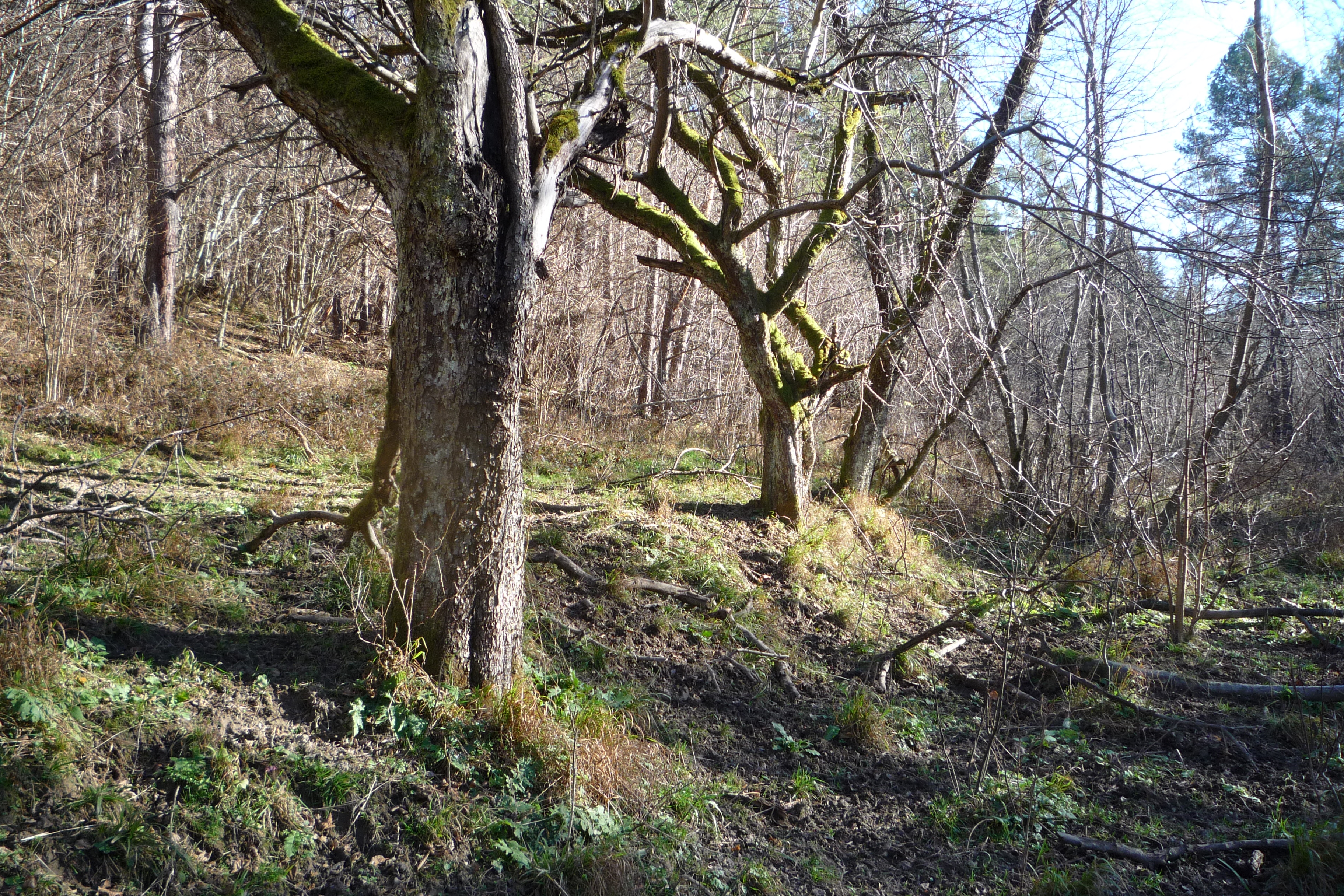 Stare jabłonie rosnące wzdłuż drogi nieistniejącej wsi.